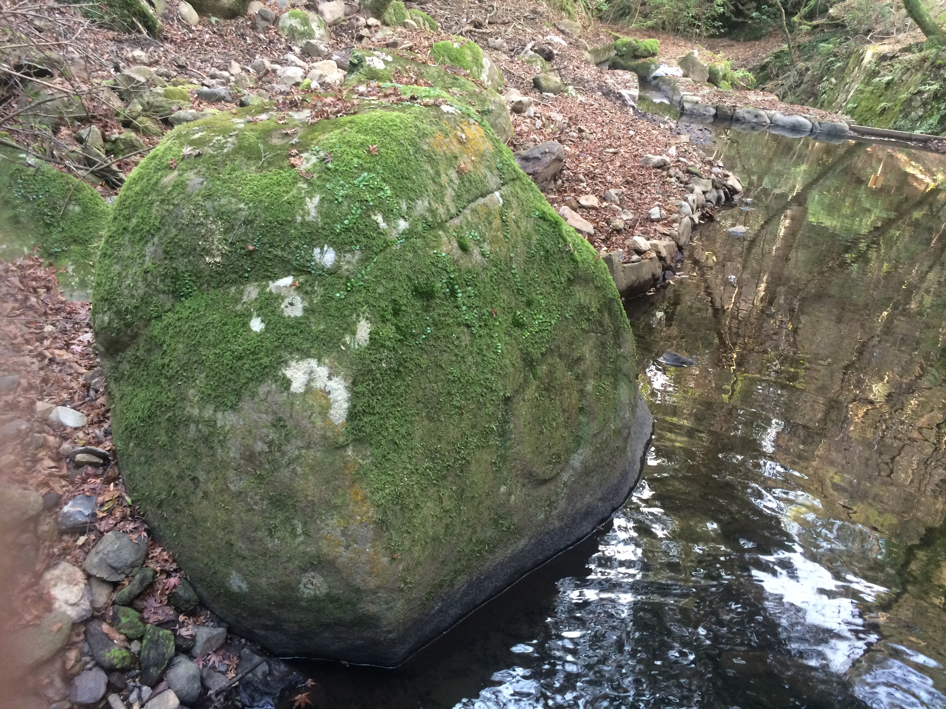 奈良、月日磐、氷室神社の元境内地。月日磐そのもの。